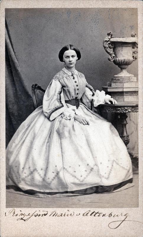 Prinzessin Marie von Sachsen-Altenburg (1845 - 1930)